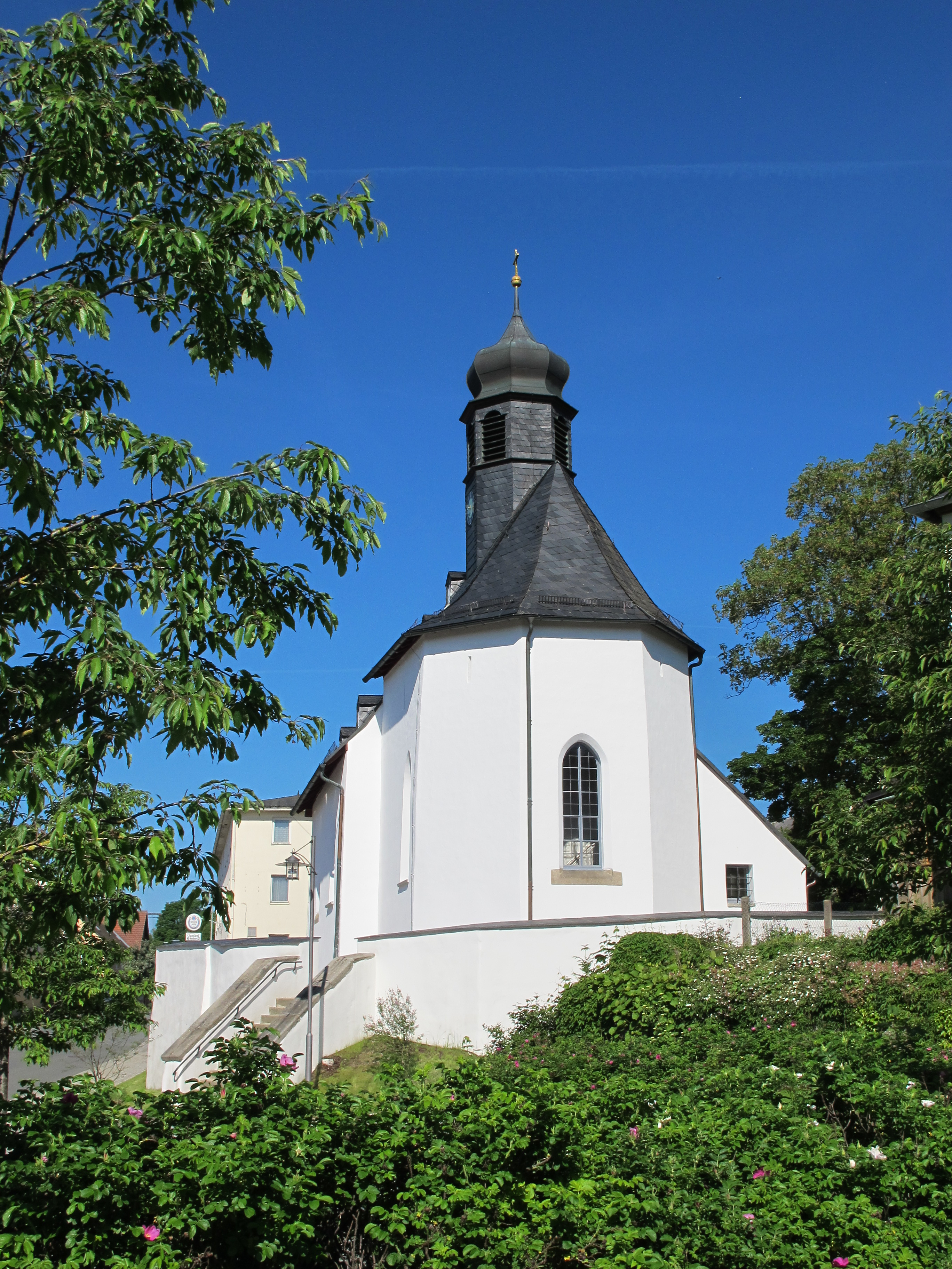 St Leonhardkirche Köditz 2016